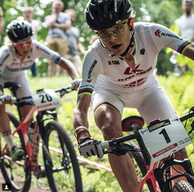 M. Włoszczcowska i J. Neff